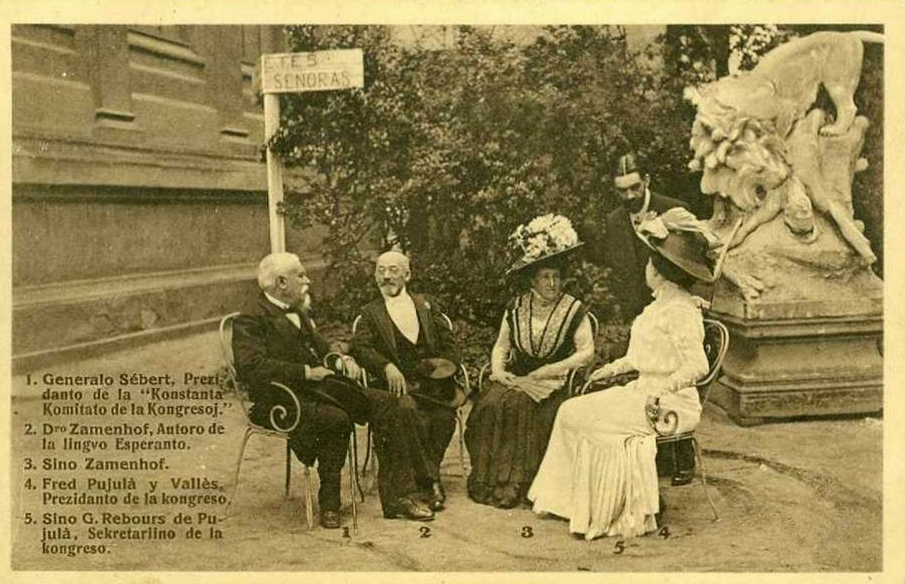 Poŝtkarto de 5-a UK-1909 en Barcelono. Vidiĝas en ĝi Generalo Sebert, L. L. Zamenhof, Klara kun komitatanoj Frederic Pujulà i Vallès, Prezidanto de la kongreso kaj Germaine Rebours de Pujulà, sekretariino.